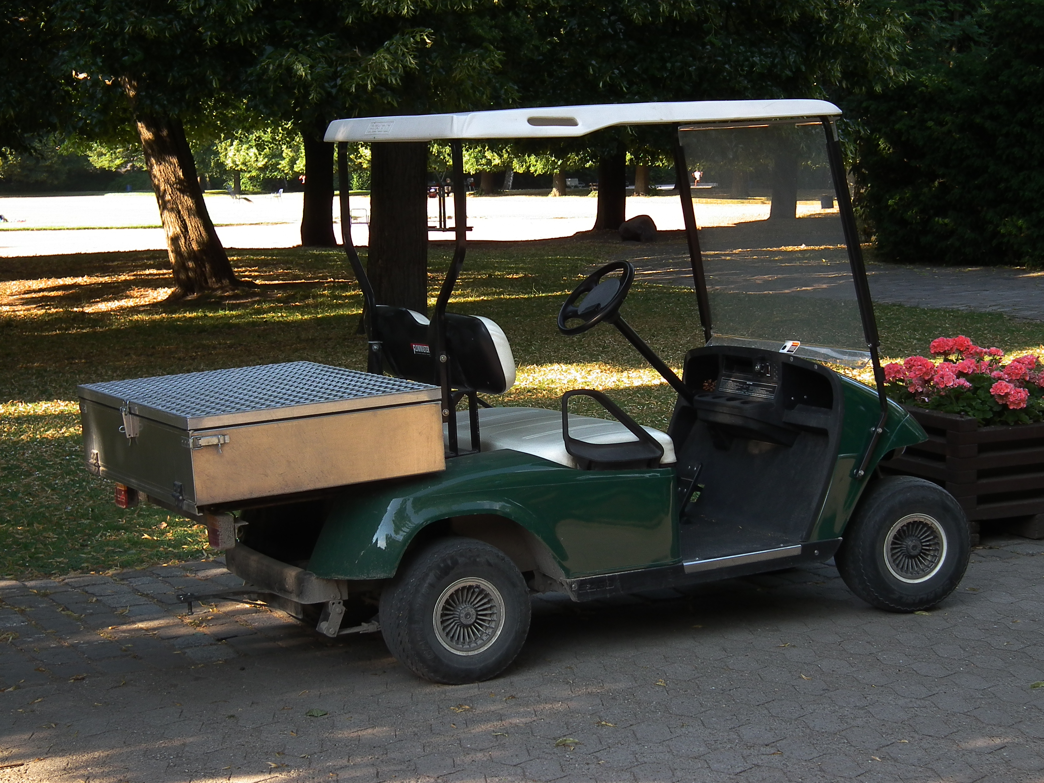 Elektrofahrzeug der Firma E-Z-GO, fotografiert im Herzogenriedpark Mannheim (Baden-Württemberg, Deutschland)